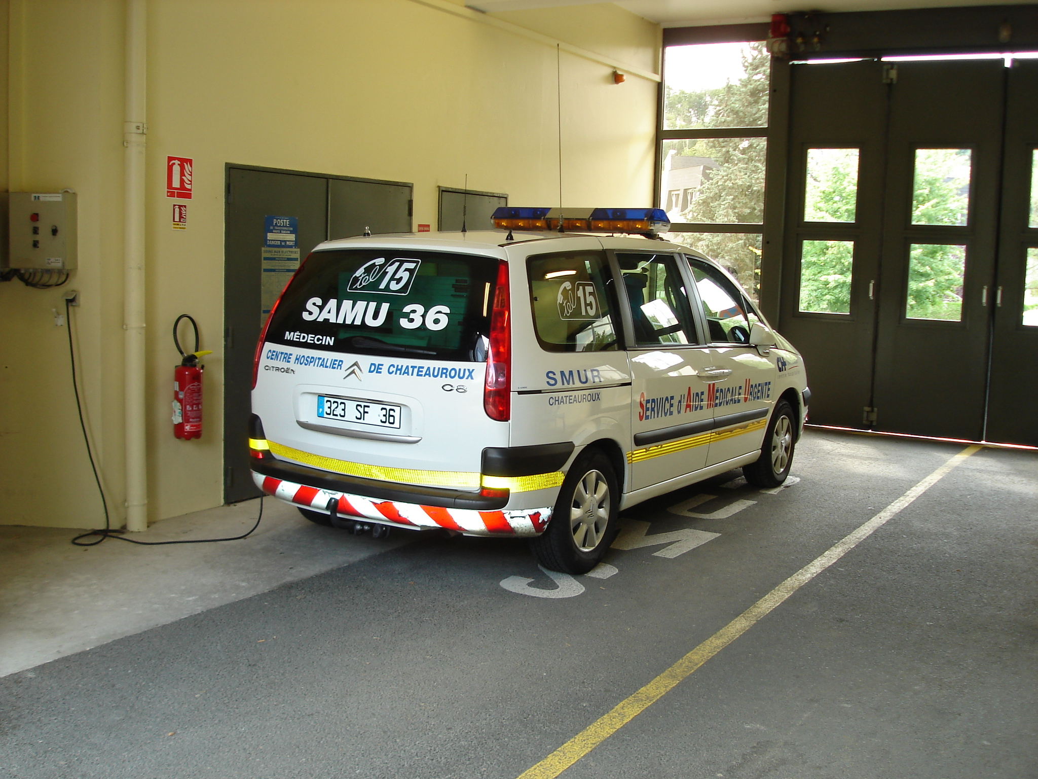 Le Blanc (36) : Le véhicule du SMUR de Châteauroux (SAMU 36).